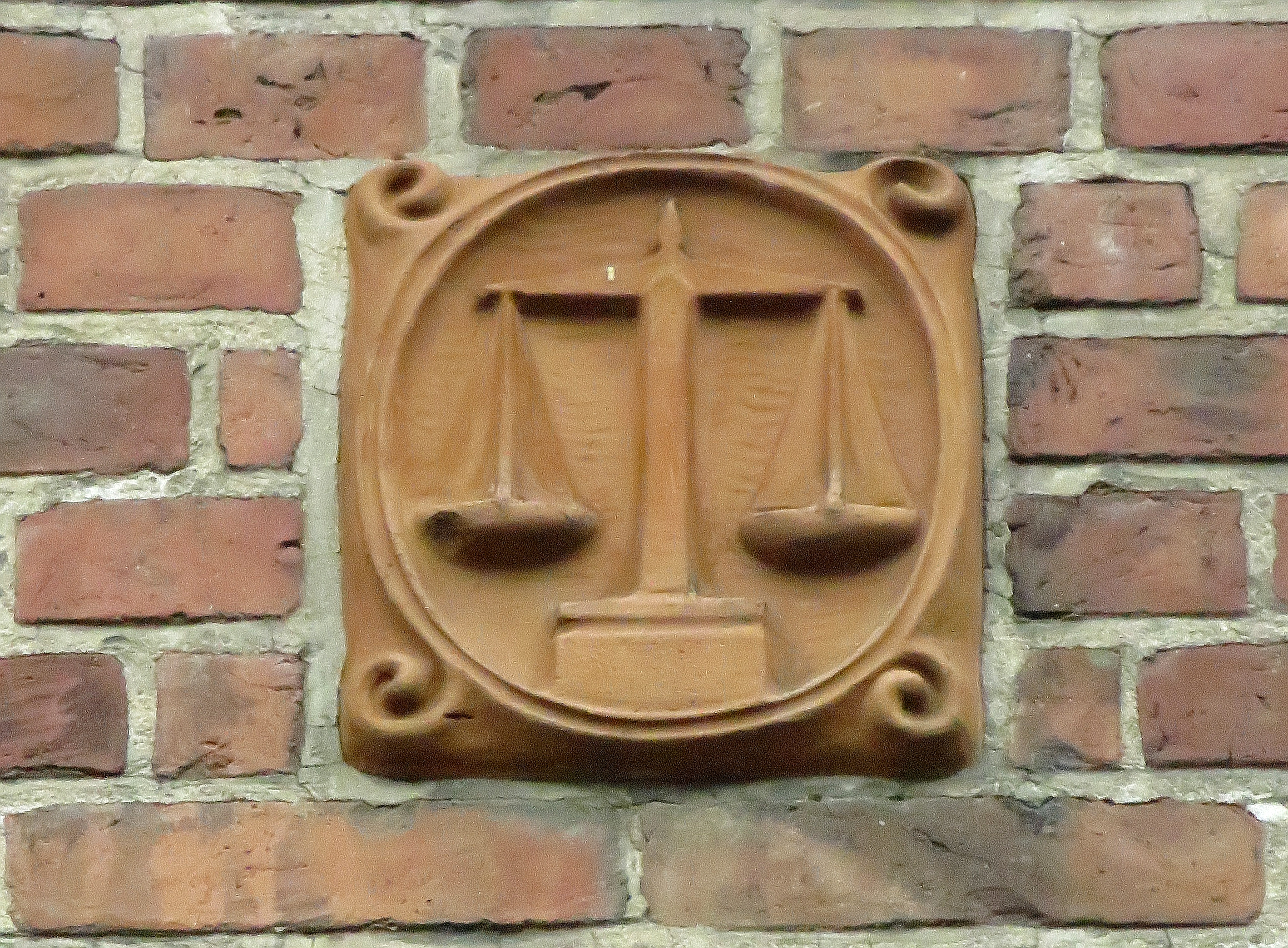 Terrakotta-Medaillon vom Flensburger Eichamt, Karlstraße 6 das auf die Funktion des Bauwerks hinweist